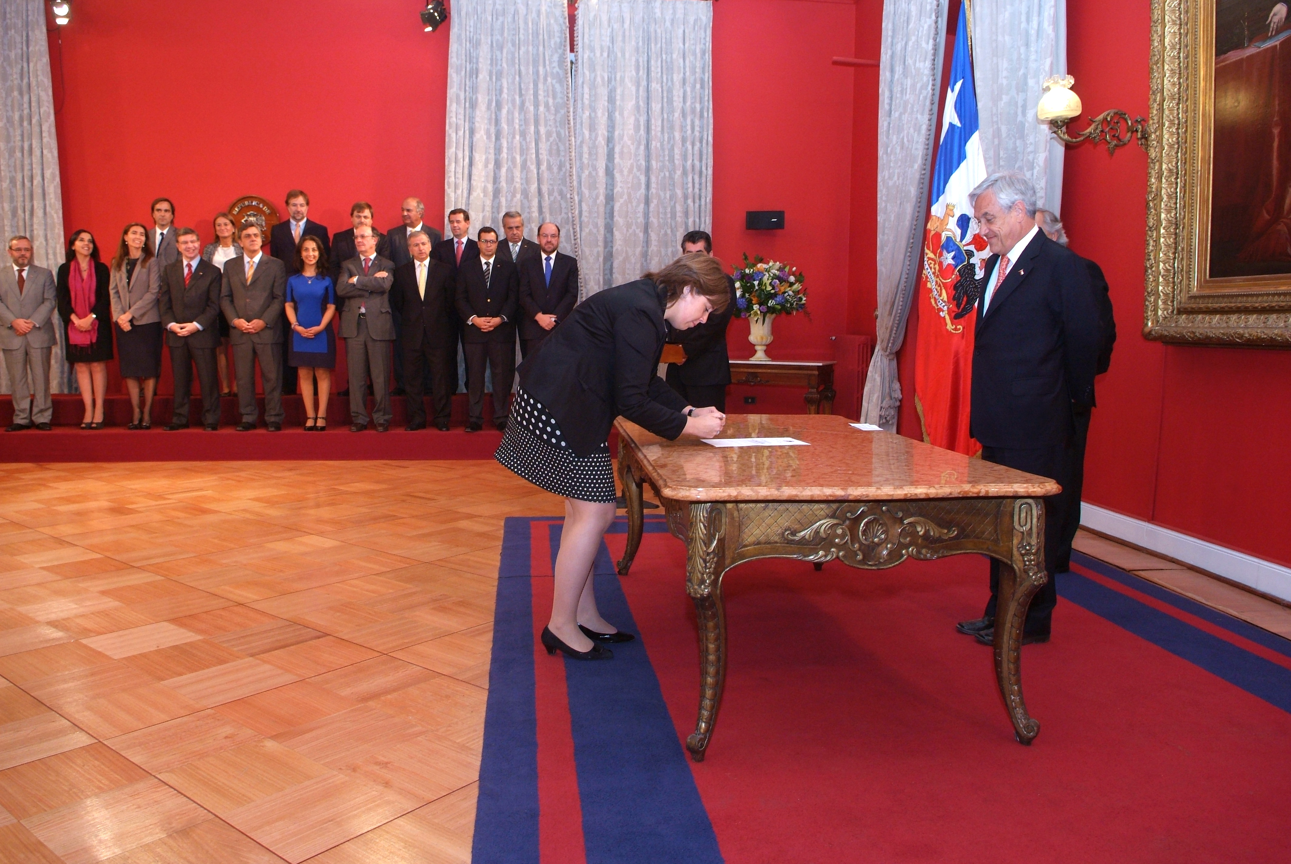 Loreto Seguel asume como ministra directora del SERNAM